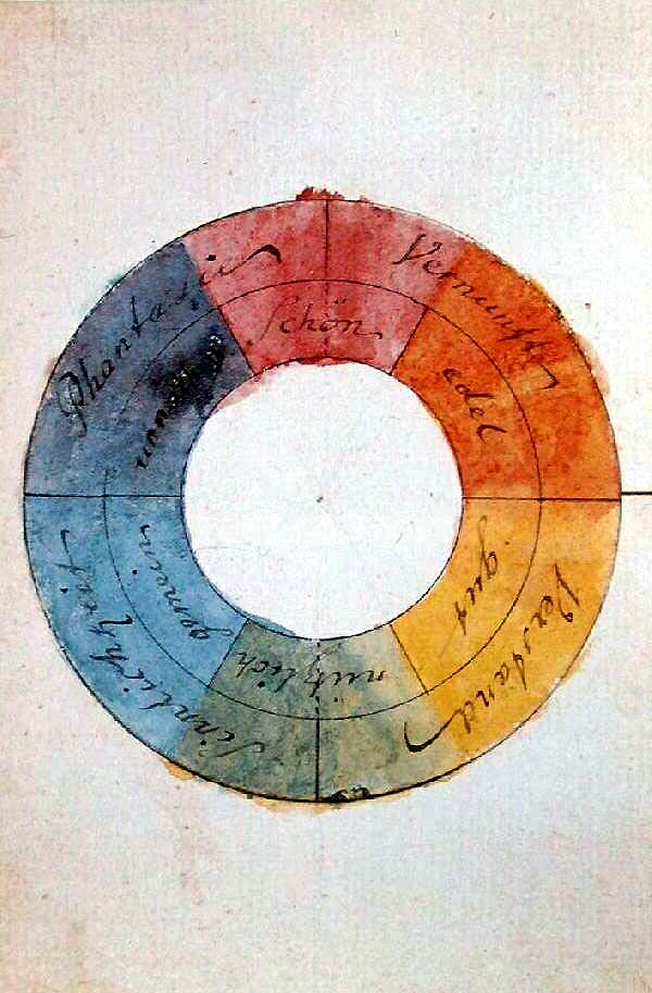 Johann Wolfgang von Goethe, Farbenkreis zur Symbolisierung des menschlichen Geistes- und Seelenlebens, 1809, Original: Freies Deutsches Hochstift - Frankfurter Goethe-Museum[1] Das Schema illustriert das Kapitel "Allegorischer, symbolischer, mystischer Gebrauch der Farbe" in Goethe's Farbenlehre. Umschrift: (innerer Ring) [rot] "schön" [orange] "edel" [gelb] "gut" [grün] "nützlich" [blau] "gemein" [violett] "unnöthig" (äusserer Ring) [rot-orange] "Vernunft" [gelb-grün] "Verstand" [grün-blau] "Sinnlichkeit" [violet-rot] "Phantasie"